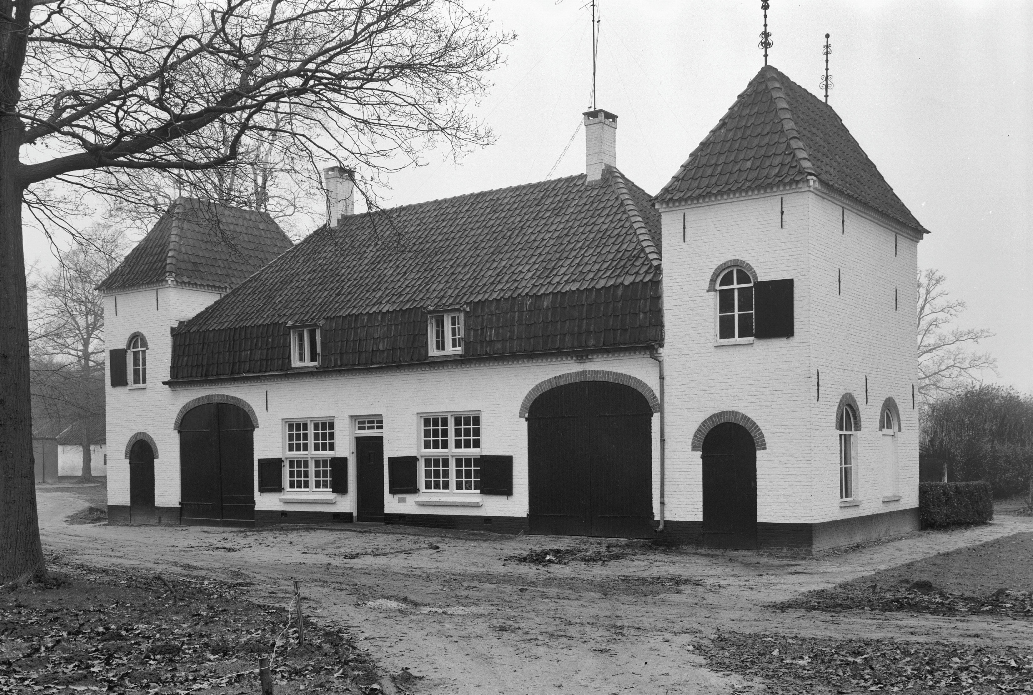 voorgevel, bij Huis te Baest